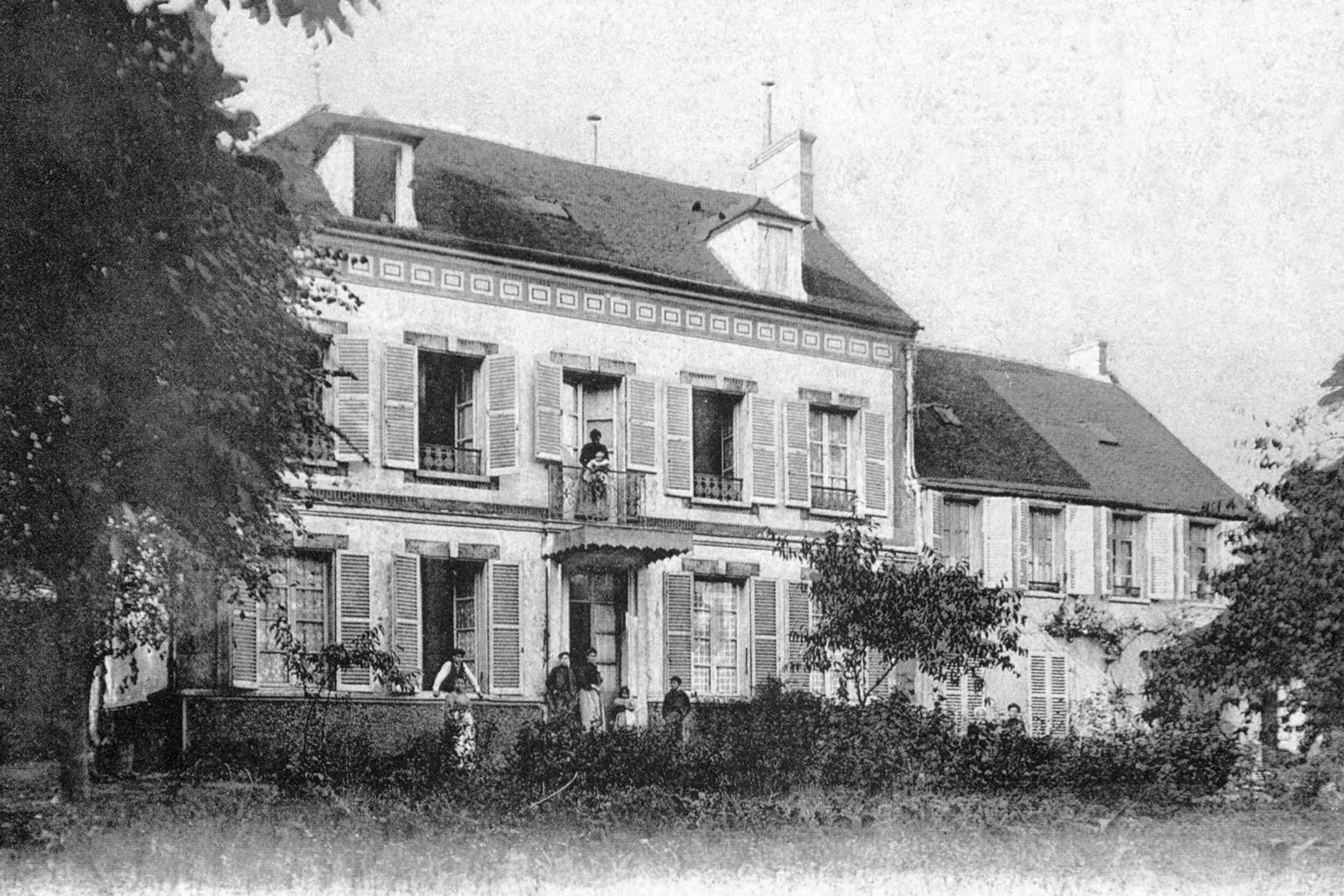 Ancien "chateau" de Villabé, ancienne propriété des ducs de Villeroy, puis de la famille Darblay. La demeure et le parc deviennent en 1972 le "Village d'enfants" / Villabé / Essonne / France